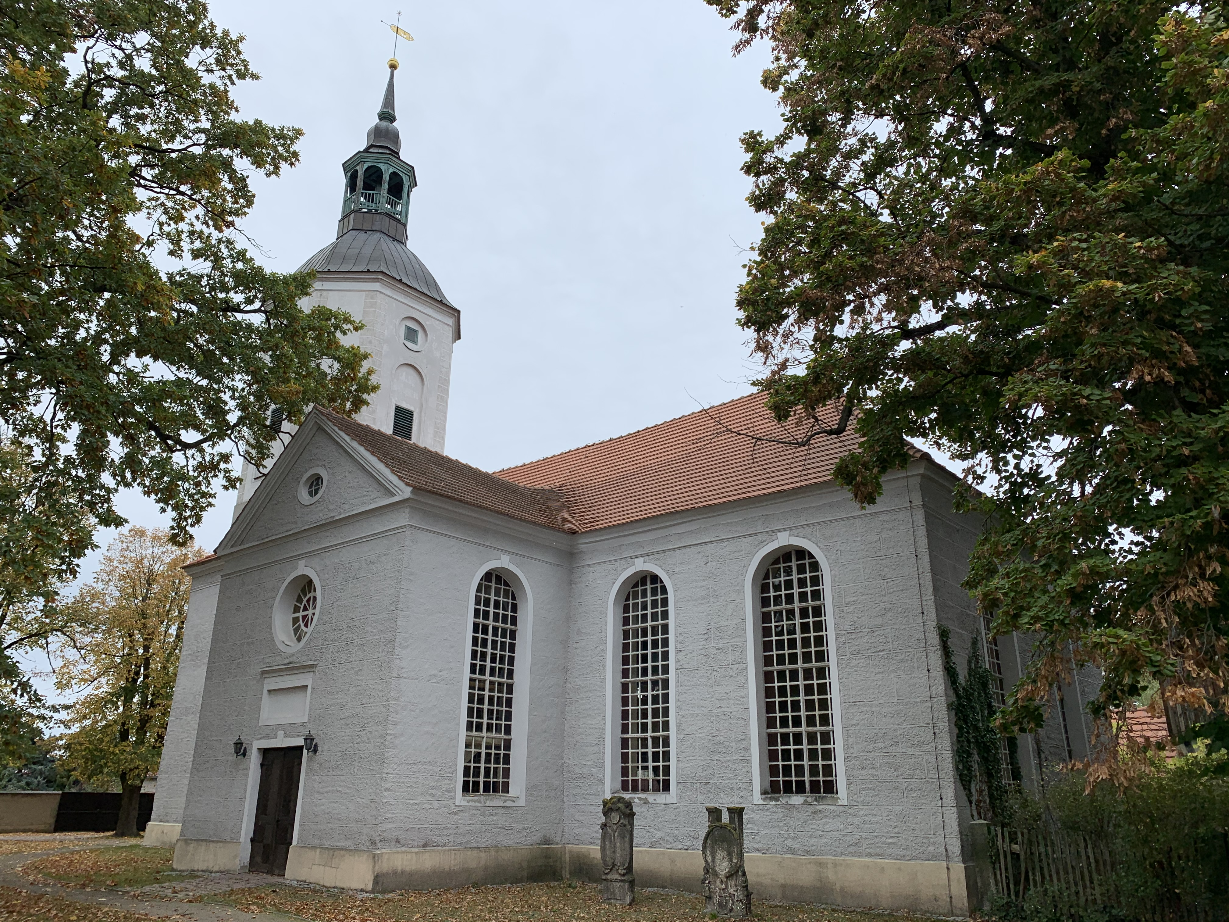 Die Stadtpfarrkirche St. Nikolai ist eine Kreuzkirche in Schönewalde im Landkreis Elbe-Elster in Brandenburg. Die Kirchenausstattung stammt aus der Bauzeit.